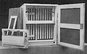 Hinterbehandlungsbeute, wie sie in der DDR Verwendung fand.